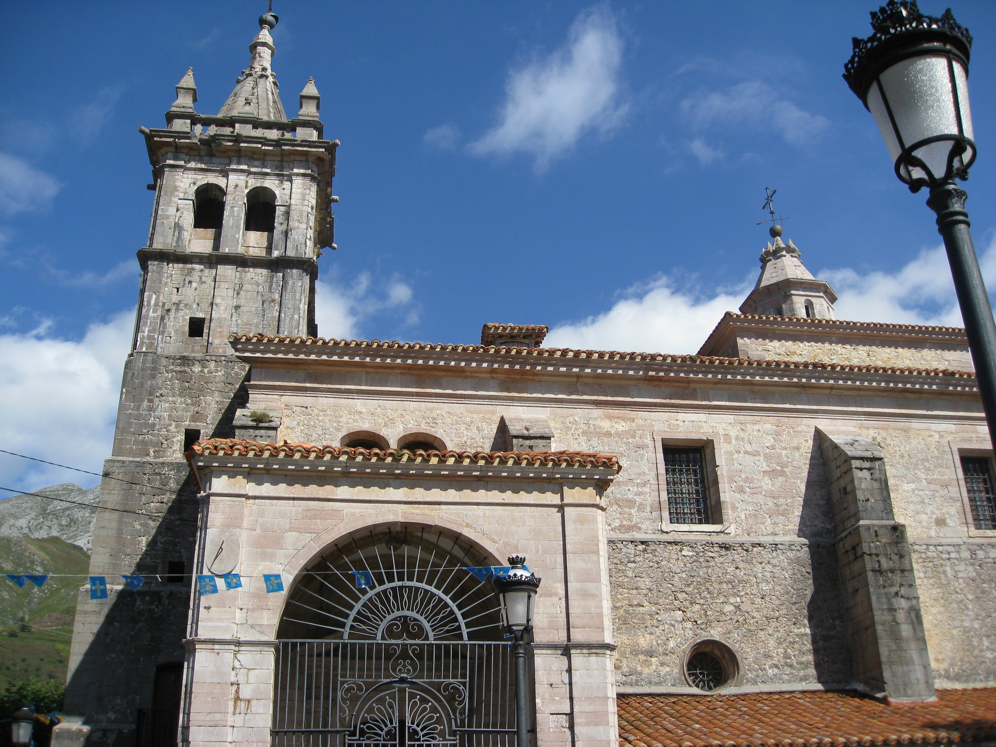 Iglesia barroca de San Pedro, Alles, Peñamellera Alata, Asturias.